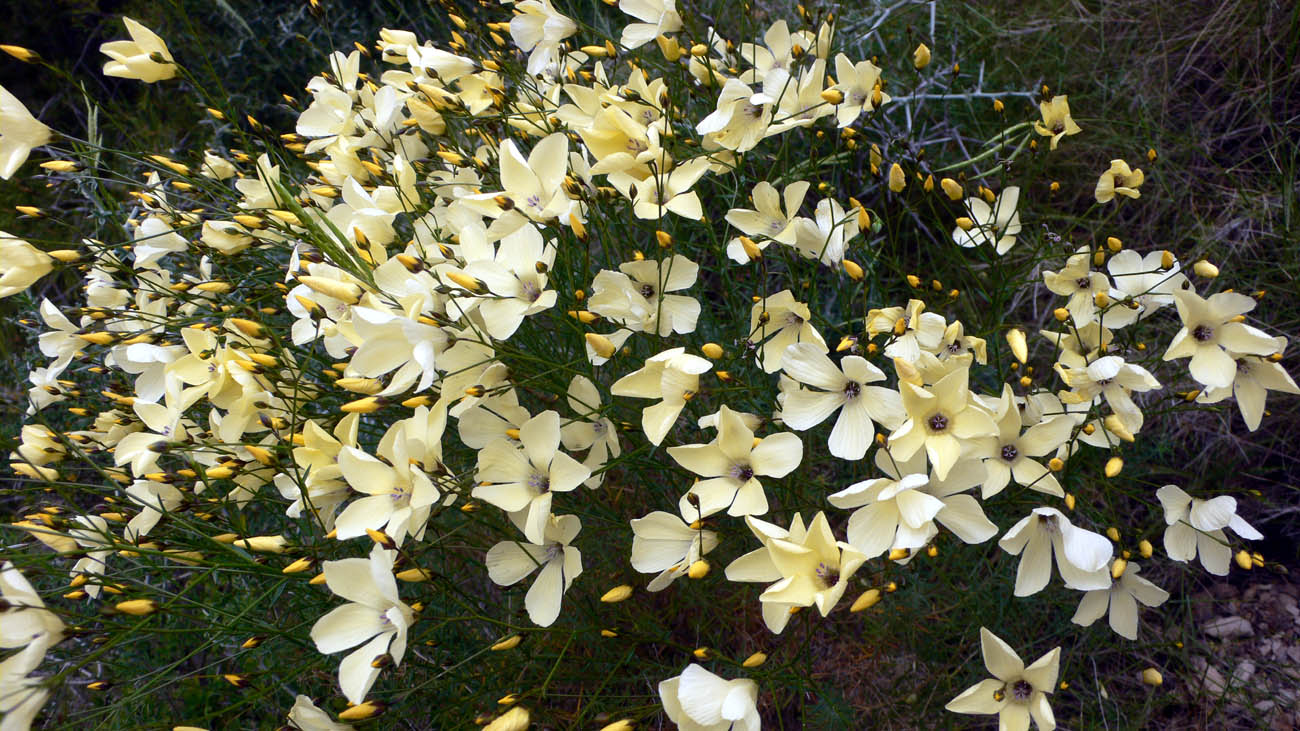 Linum suffruticosum ssp. jimenezii